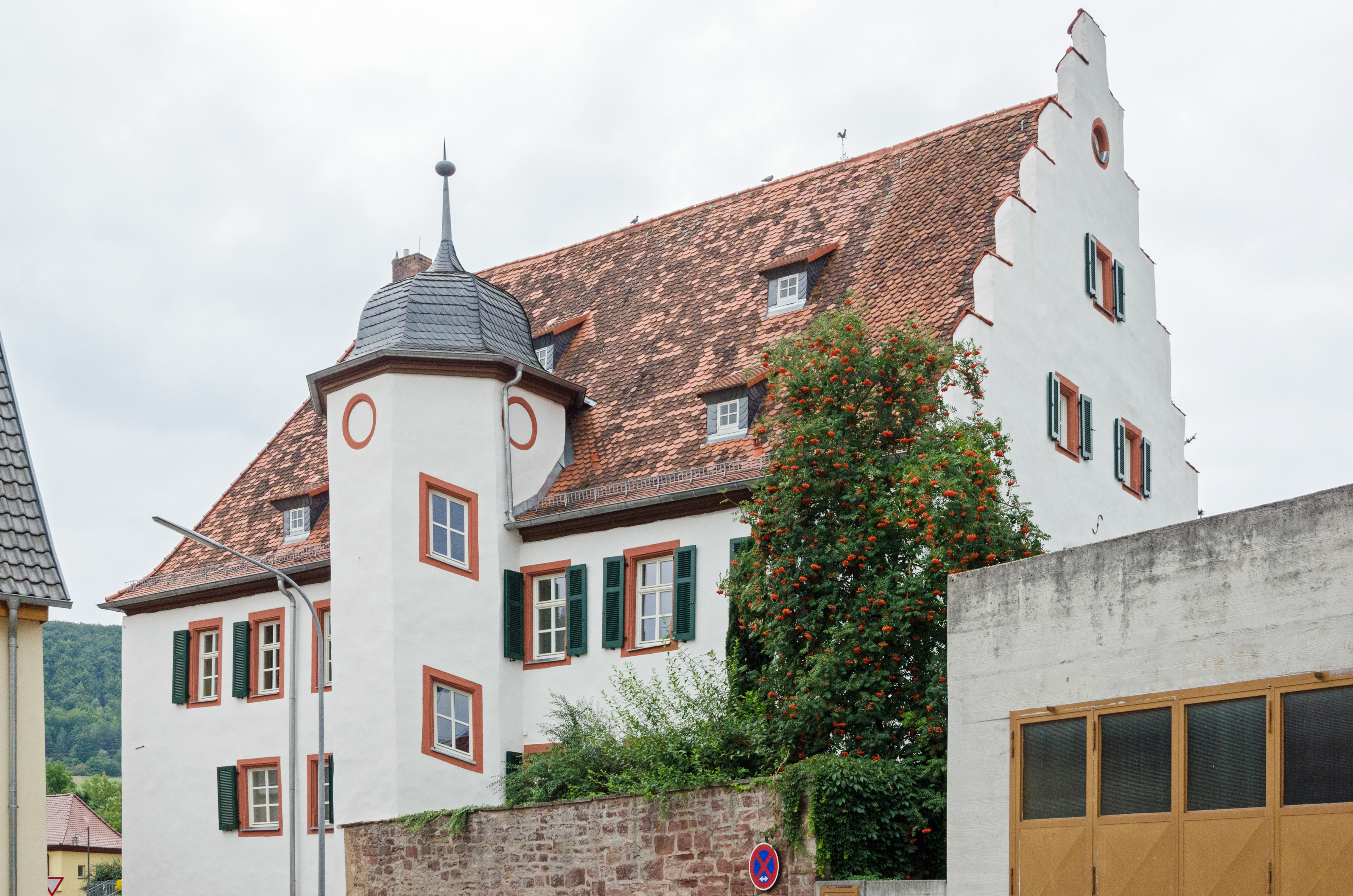 Euerdorf, Gerichtsgasse 22